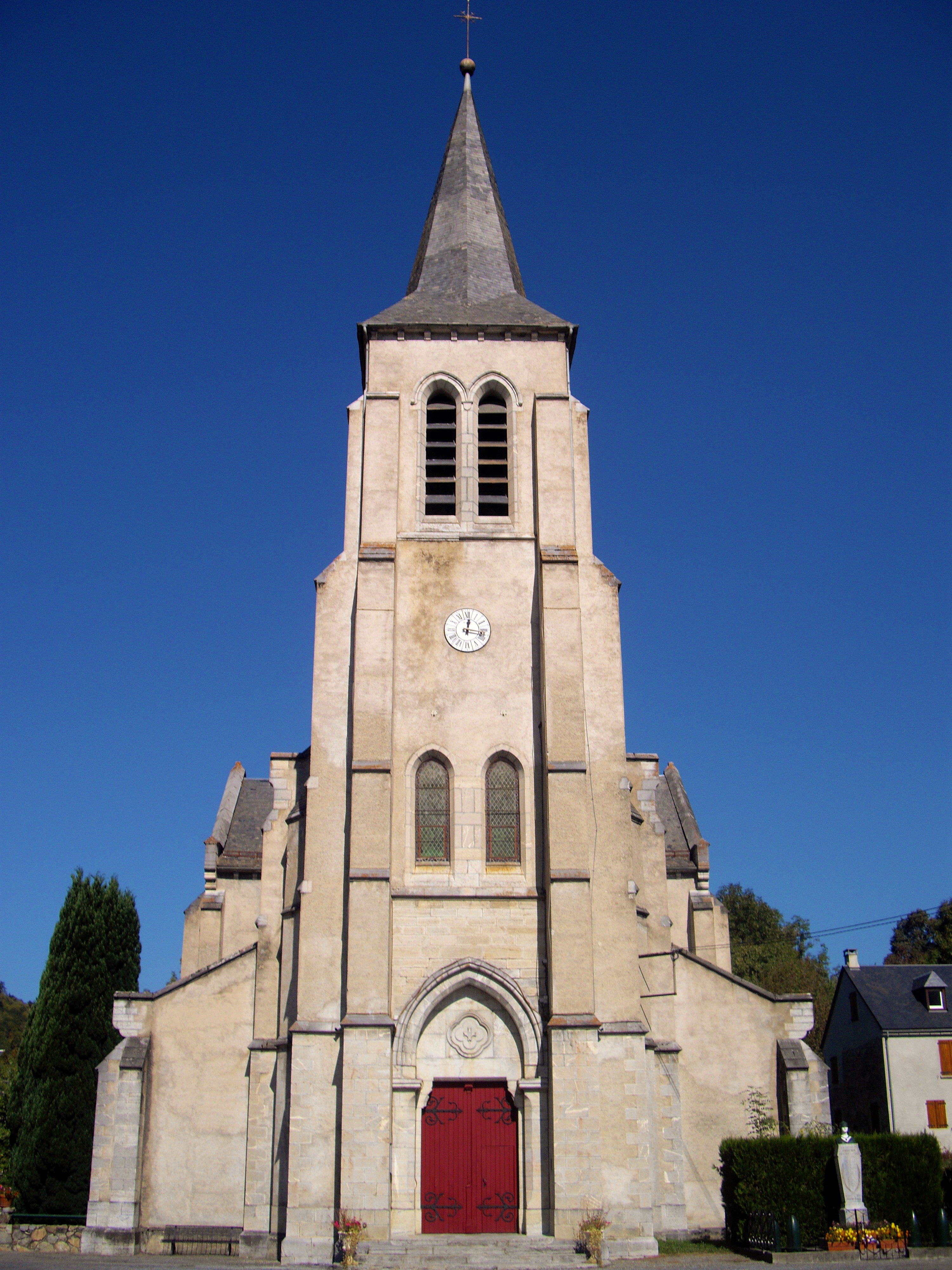 Église paroissiale Notre-Dame de l'Assomption de Bordères-Louron, Hautes-Pyrénées, France